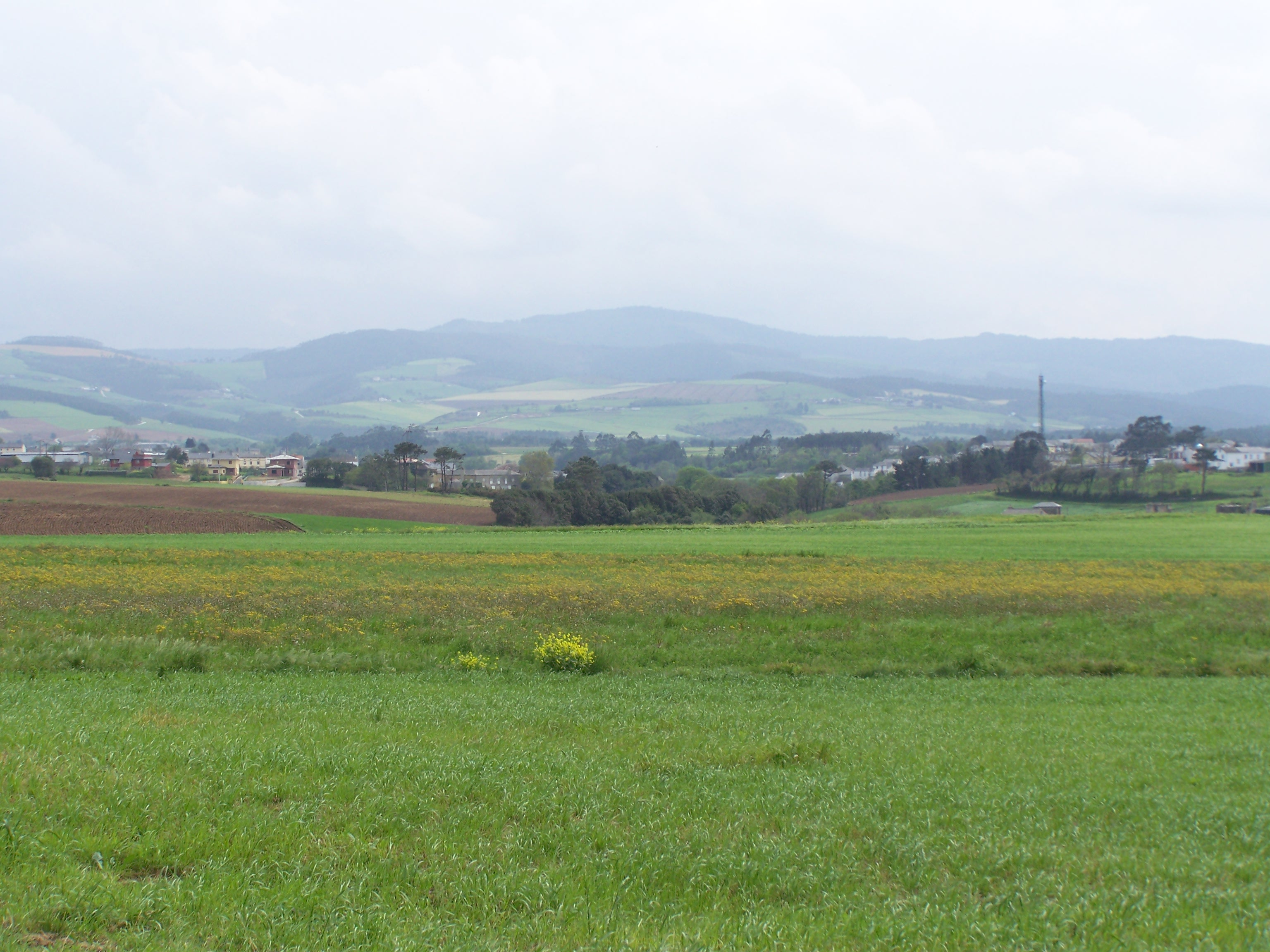 Serantes